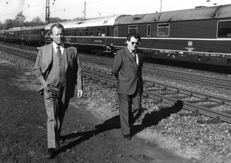 Bundeskanzler Willy Brandt in Niedersachsen